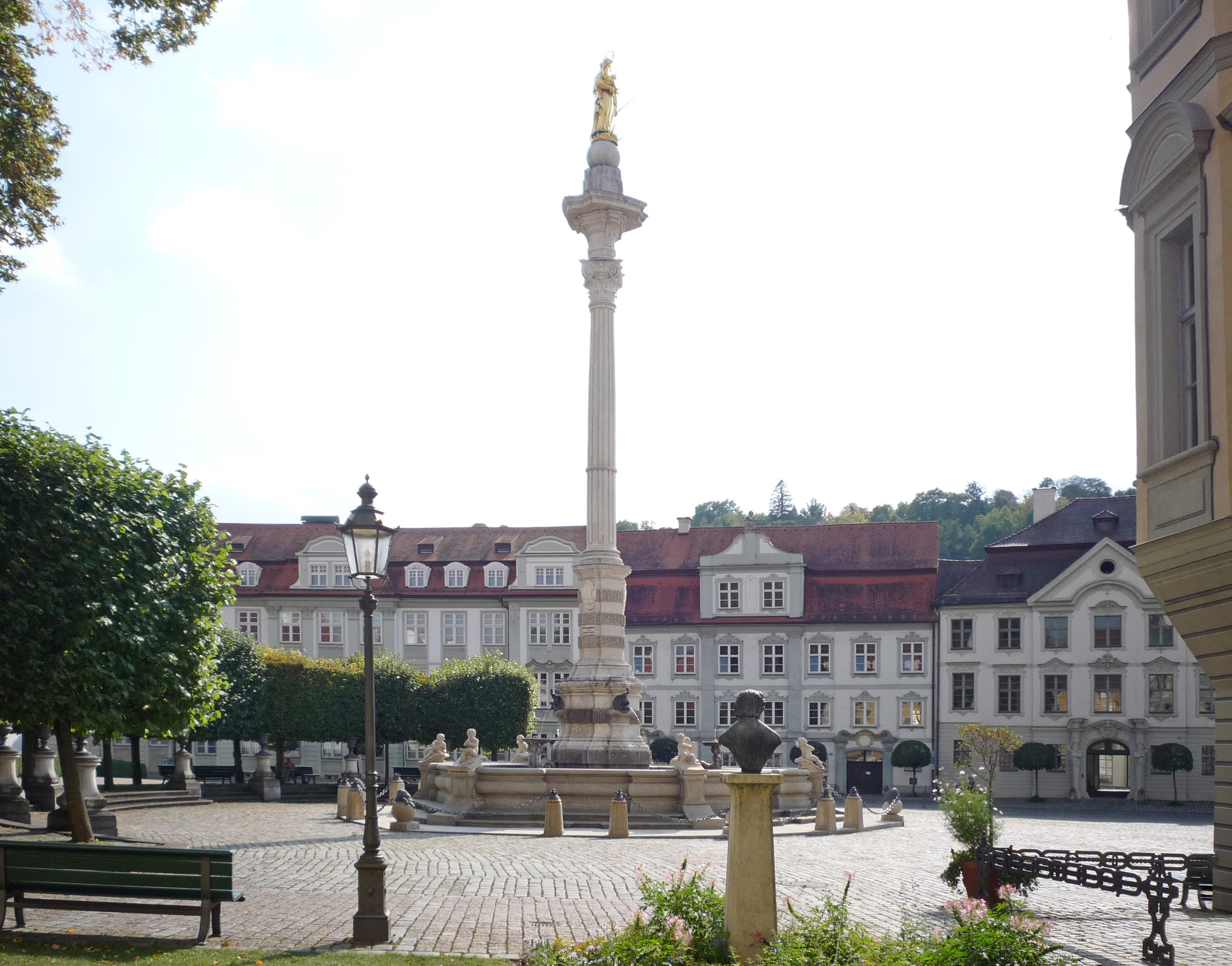 Eichstätt: Residenzplatz mit Marienbrunnen und 19 m hoher Mariensäule)